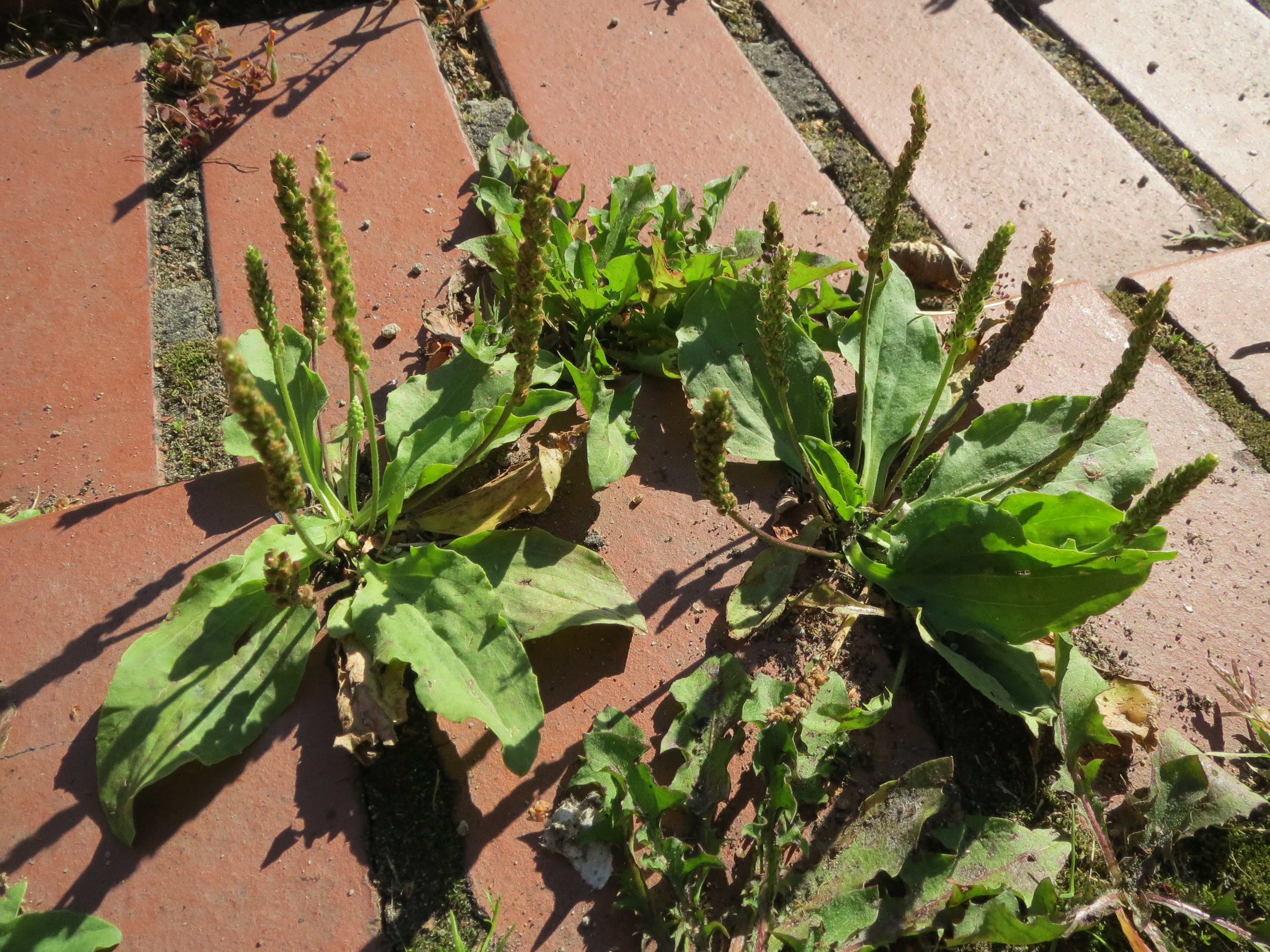 Breitwegerich (Plantago major) im Bürgerpark Saarbrücken